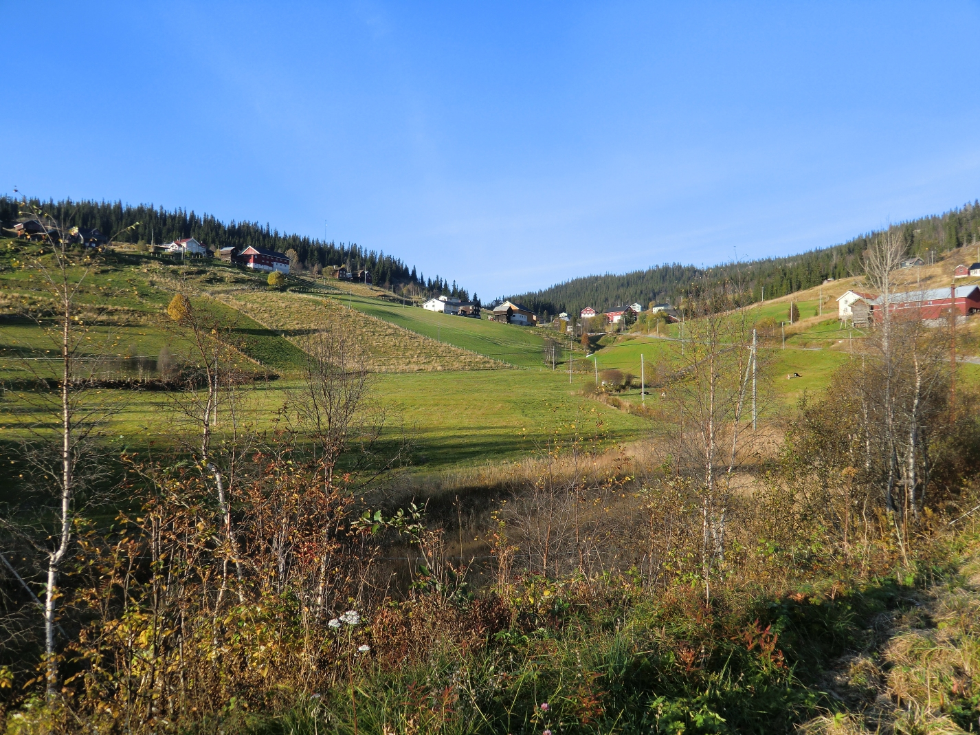 Langlim i Seljord